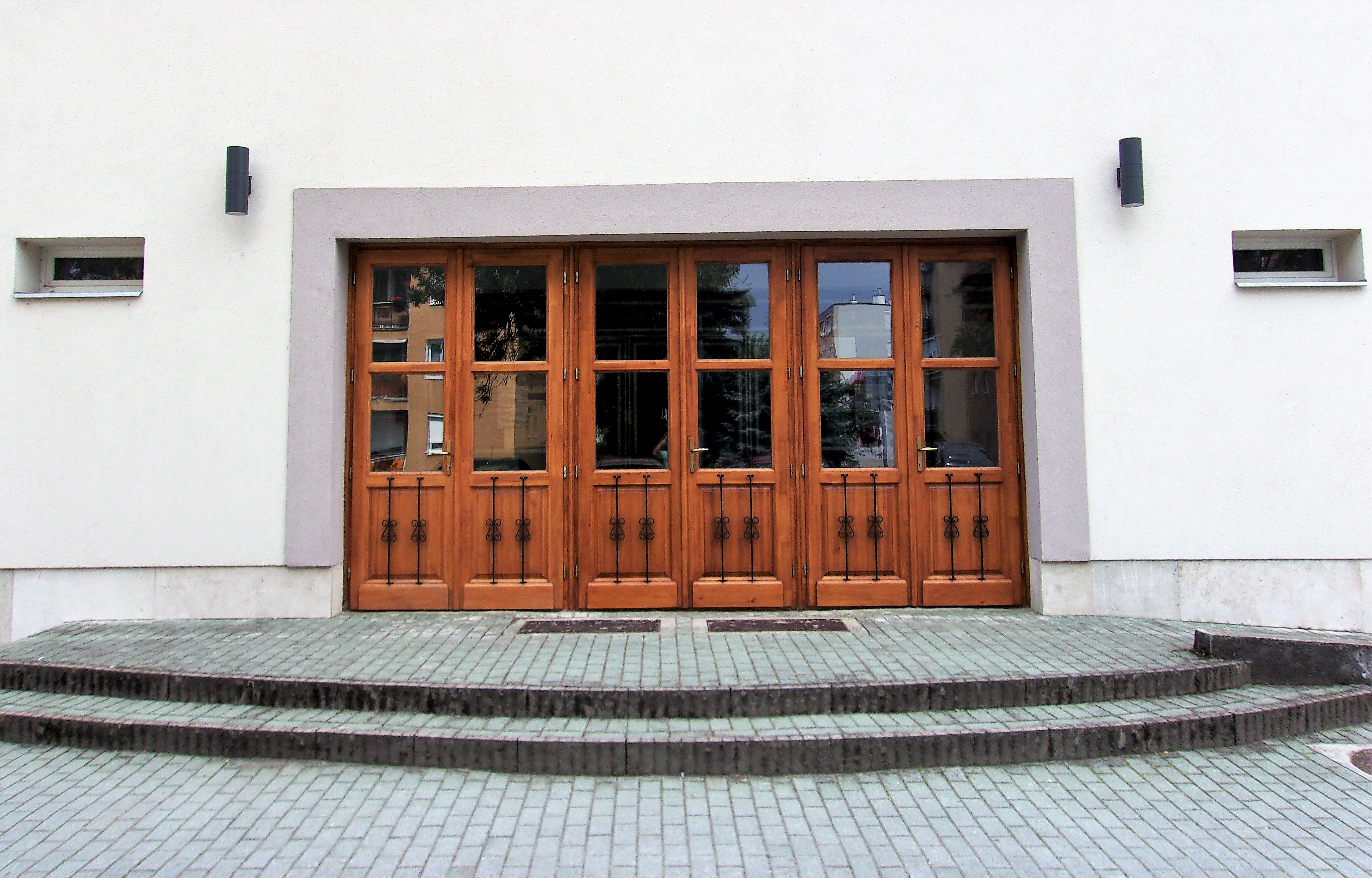 Városi Kiállítóterem. Kazincbarcika, Egressy tér 5.